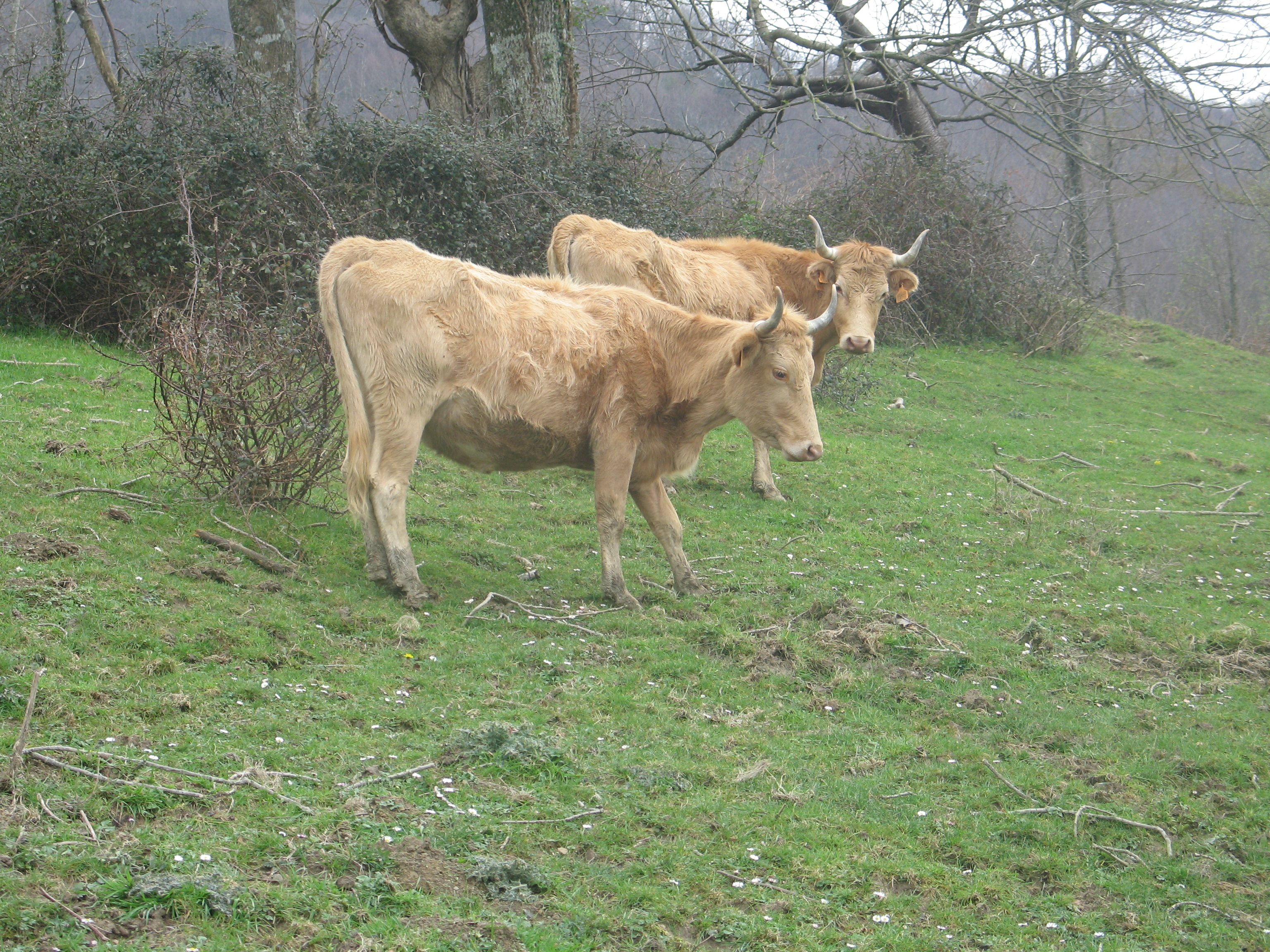 Betziuak Pagoetako Parke Naturalean.